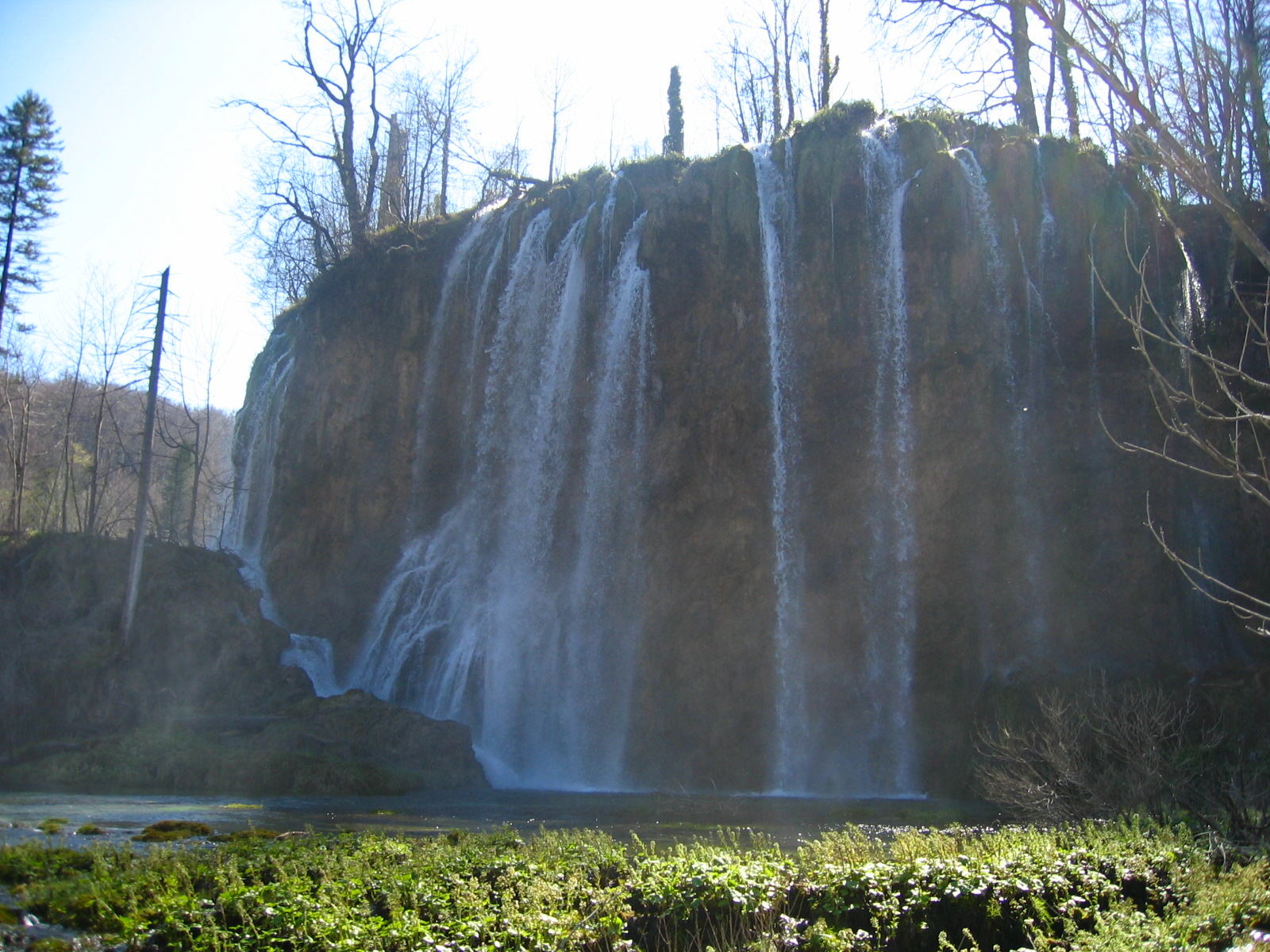 National Park Plitvice Lakes (Croatia), Galovački buk